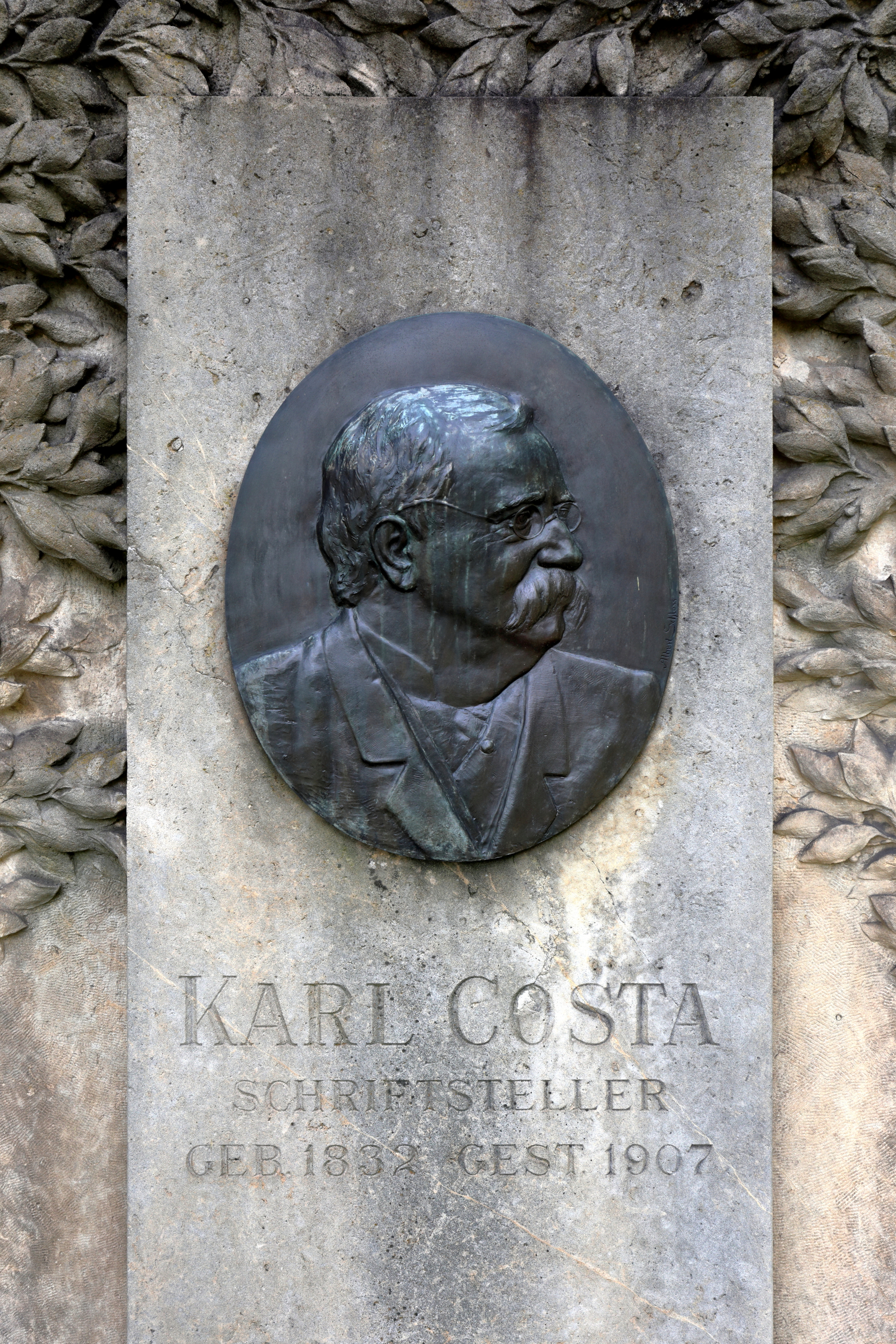 Das Grabmal des österreichischen Schriftstellers und Librettisten Karl Costa am Wiener Zentralfriedhof im 11. Wiener Gemeindebezirk Simmering (Gruppe 0, Reihe 1, Nummer 68). Das Bronzerelief auf dem Grabmal ist ein Werk von Albert Schloß.